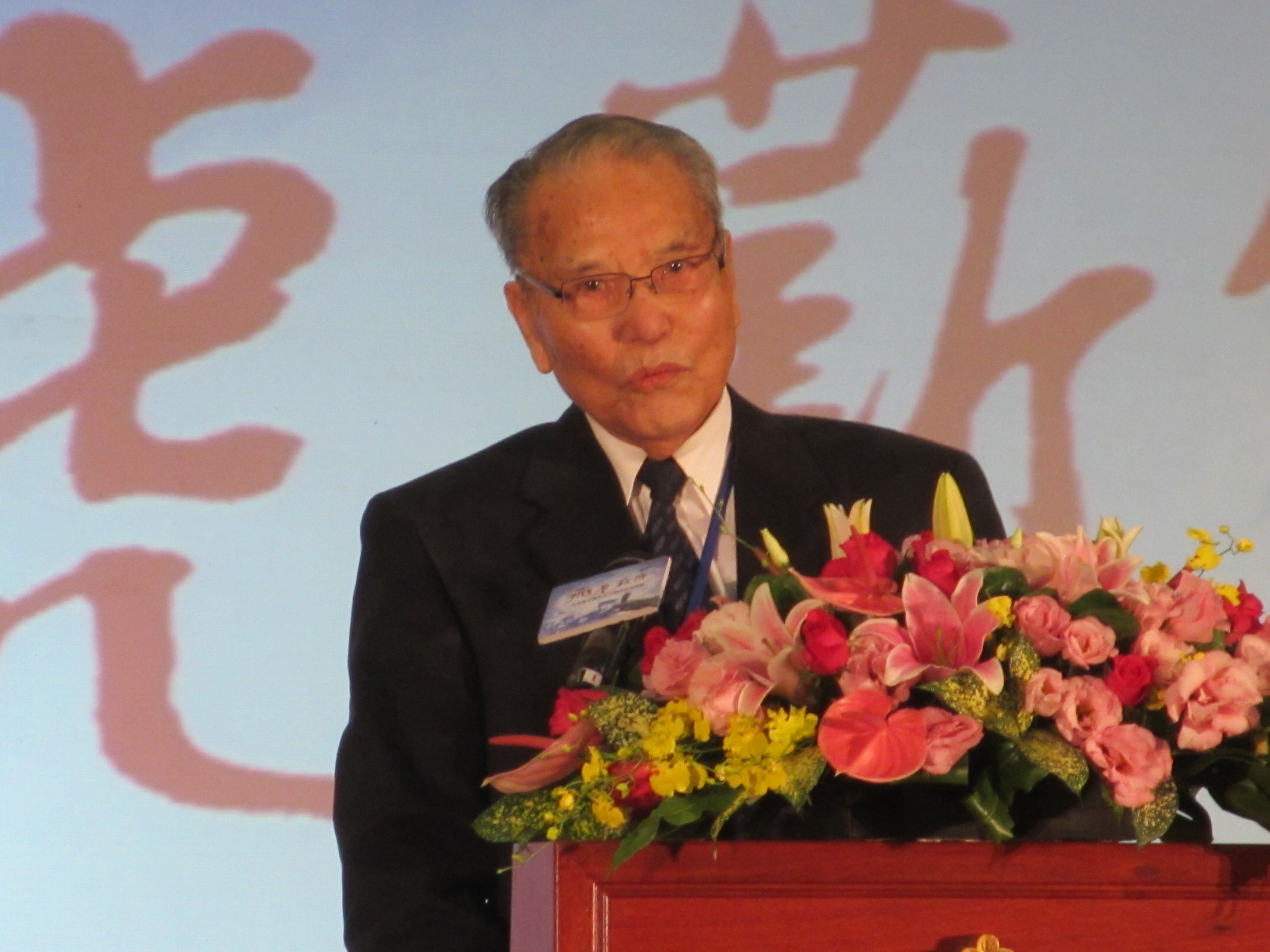 飛虎隊成員、前中華民國空軍副司令陳鴻銓中將出席國防部飛虎薪傳特展。